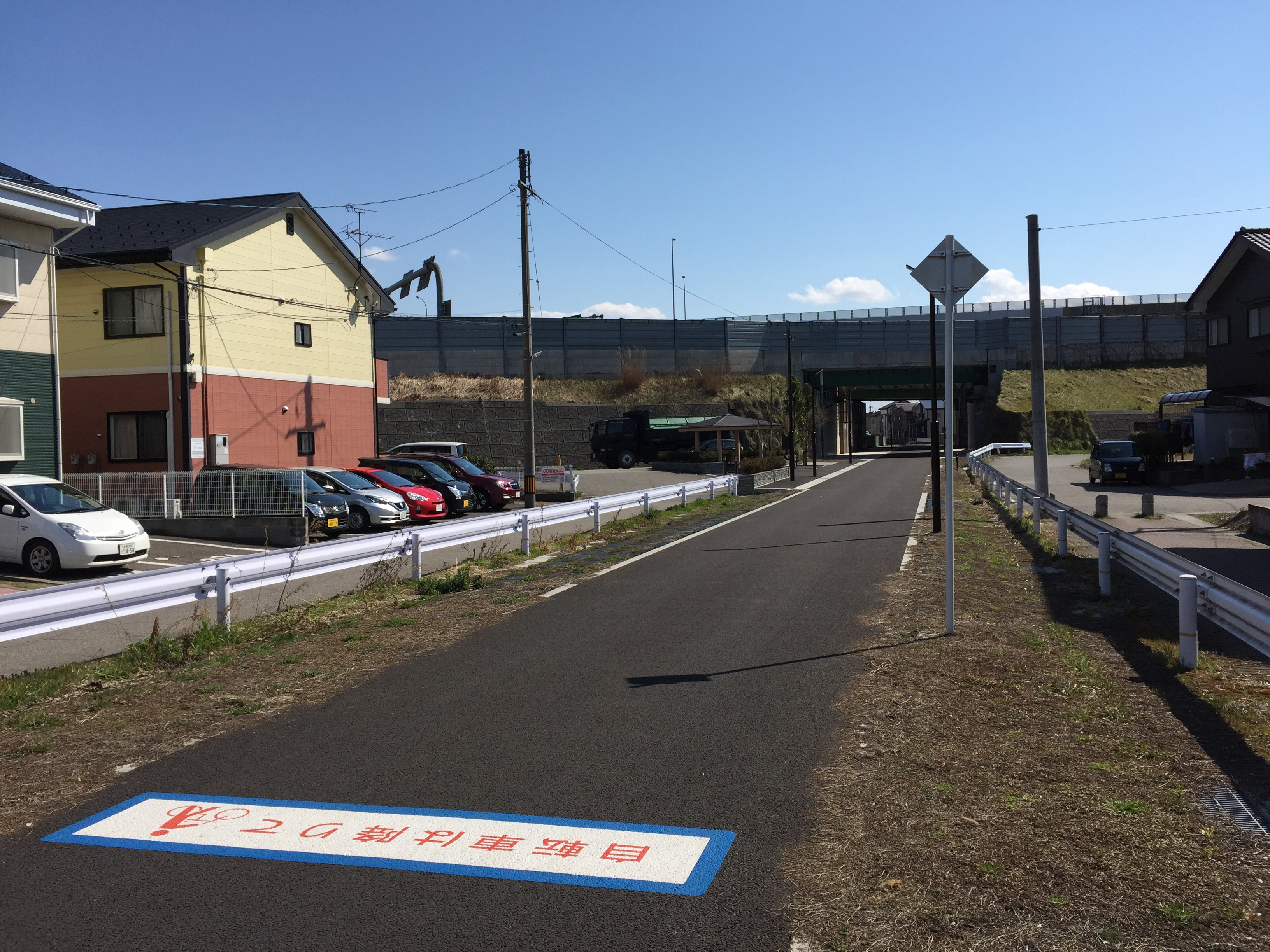 1999年4月5日に廃止された新潟交通ときめき駅跡（2017年4月2日撮影）